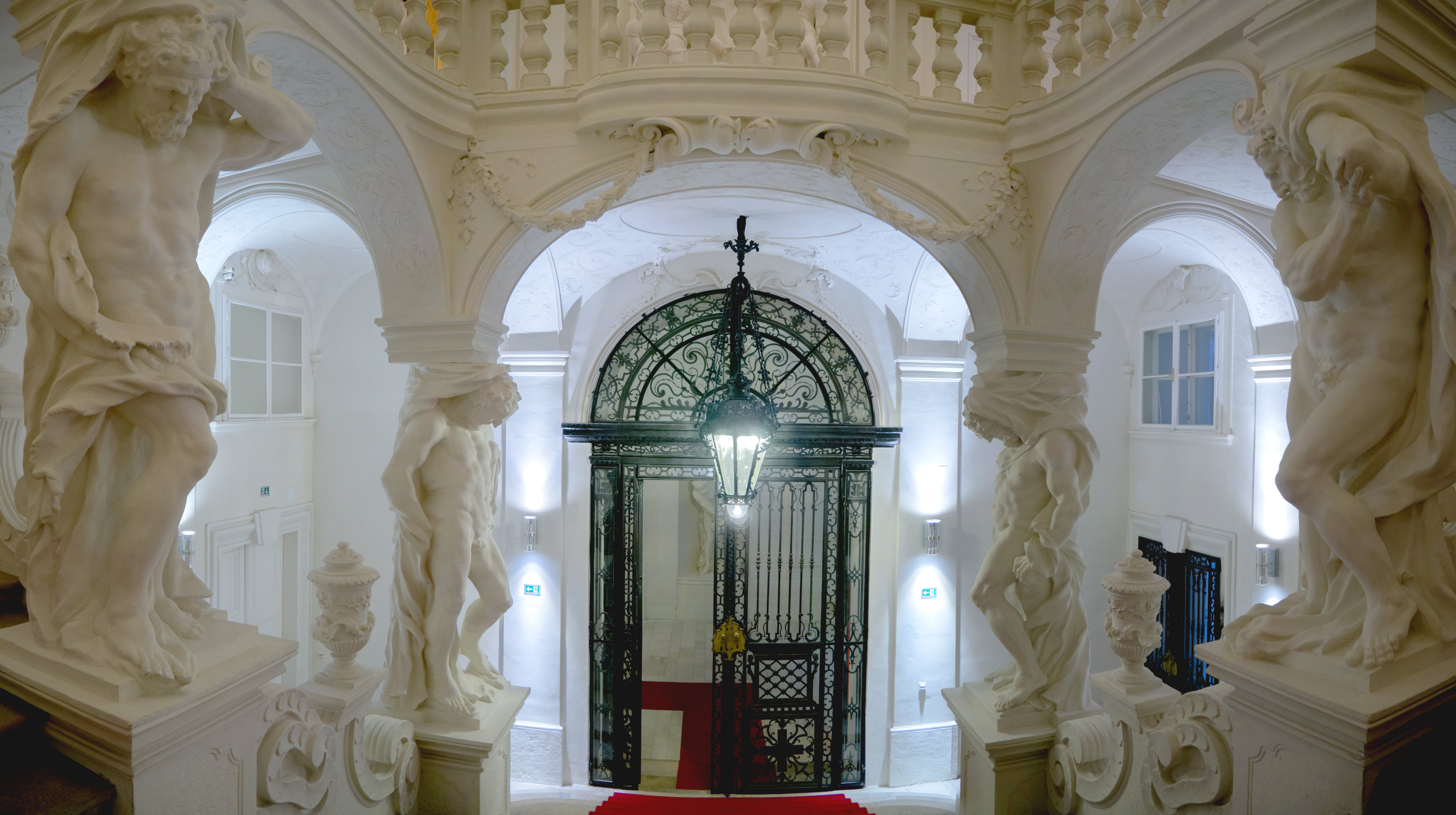 Ehem. Stadtpalais des Prinzen Eugen, BM für Finanzen